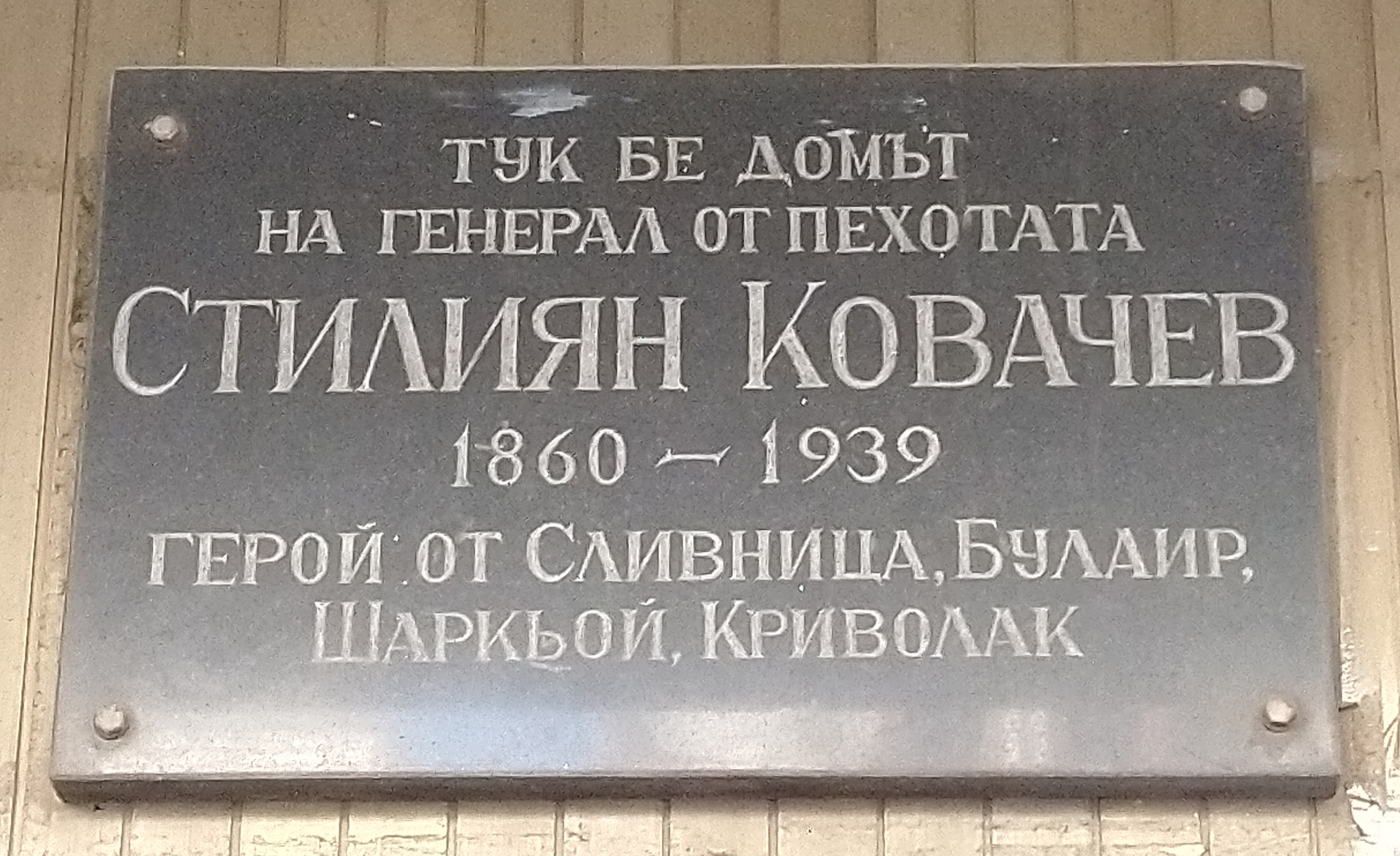 Паметна плоча на генерал Стилиян Ковачев, ул. Раковски 134, София